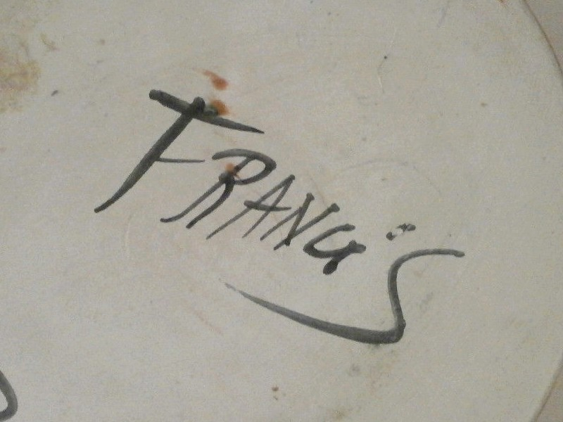 Signature de Francis Crociani, Vallauris, Atelier Cerenne